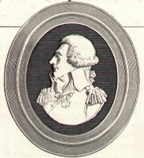 LaFayette Motors logo, scanned from 1921 magazine ad